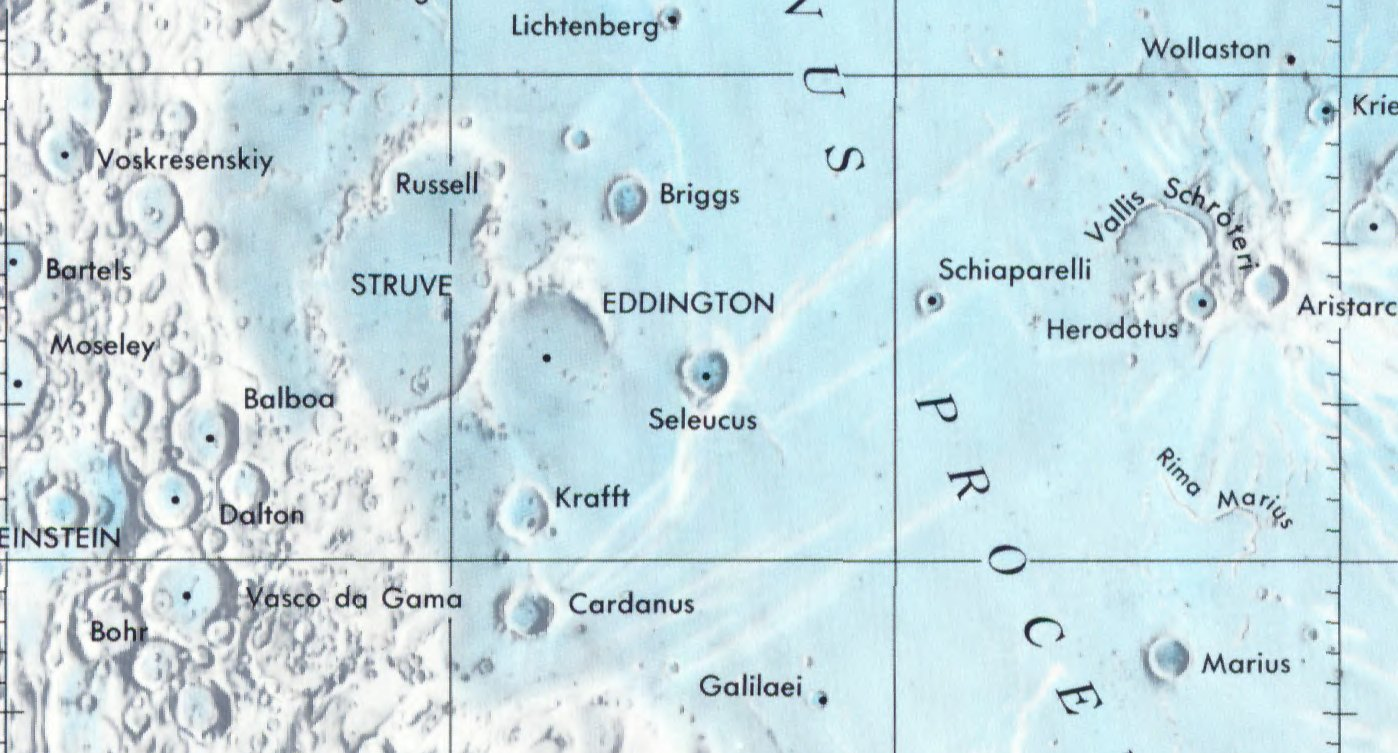 Cráter lunar Seleucus. Localización. (Lunar Chart LPC1. Second Edition)